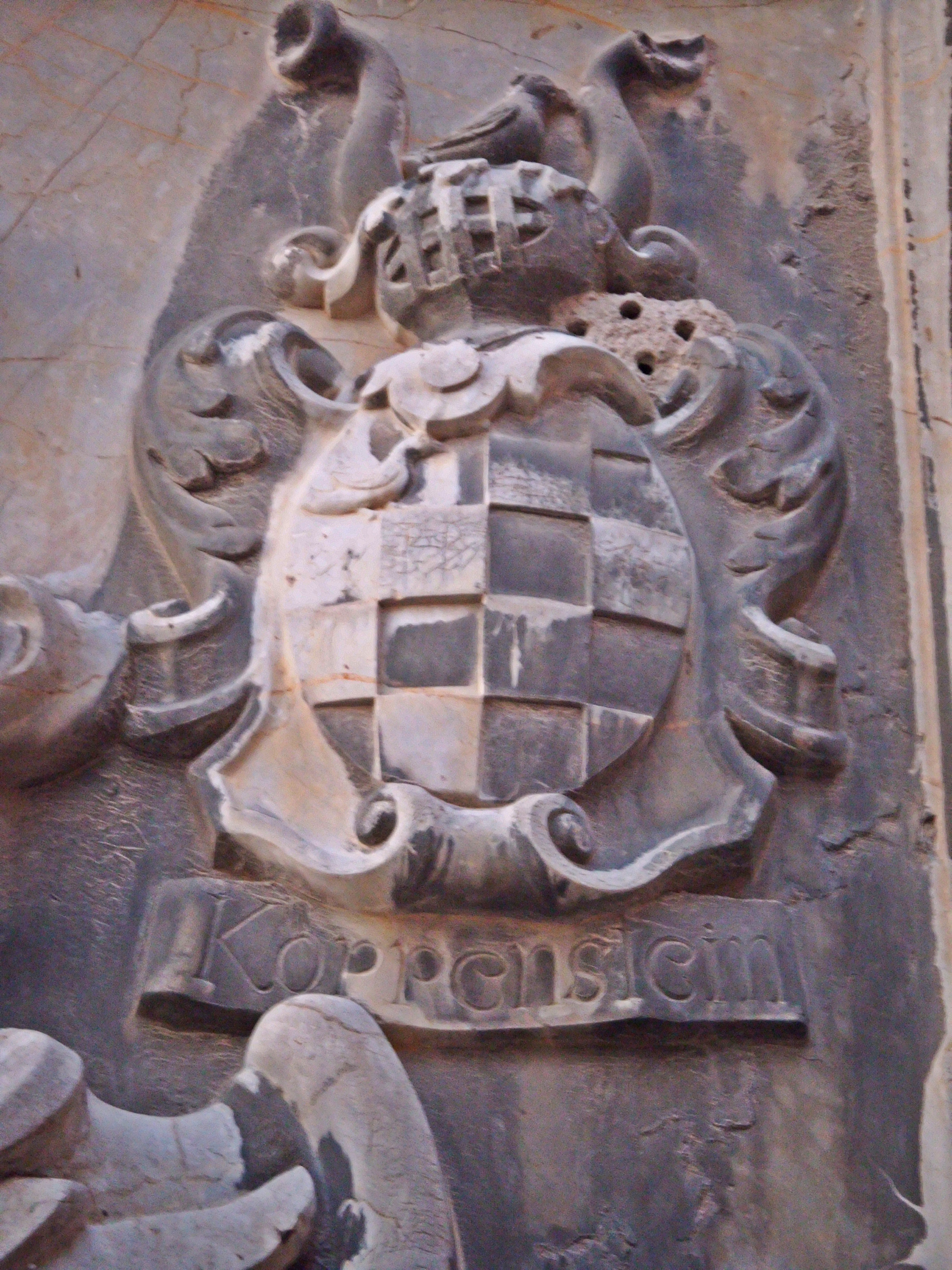 Wappen derer von Koppenstein. Ahnenwappen am Epitaph des Domdekans Hermann Lothar von Auwach (+ 1722), Speyerer Dom, Südseite, außen. Oben rechts im Wappen, das Nest einer Mörtelbiene